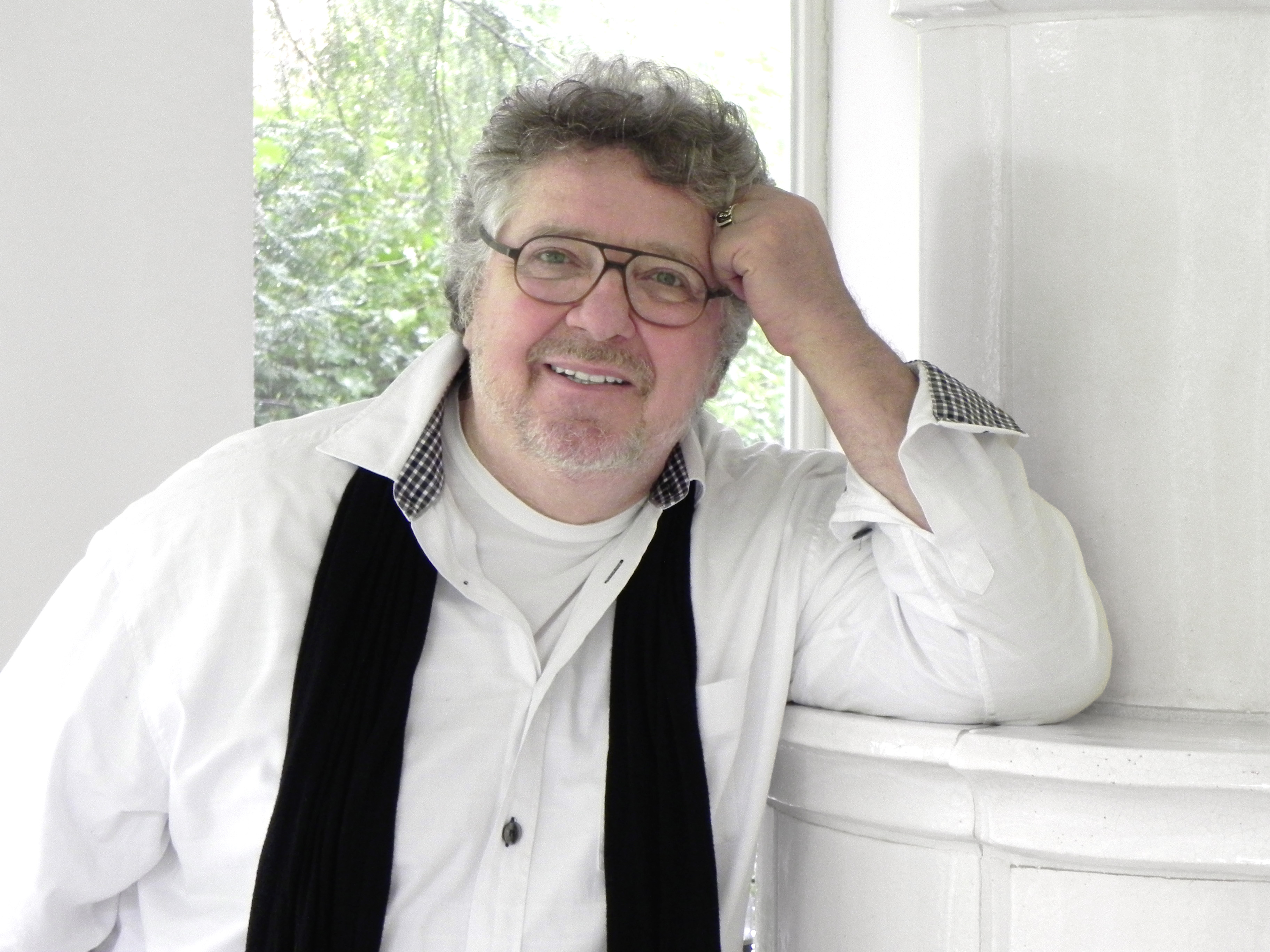 Michael Schanze in München (2016)